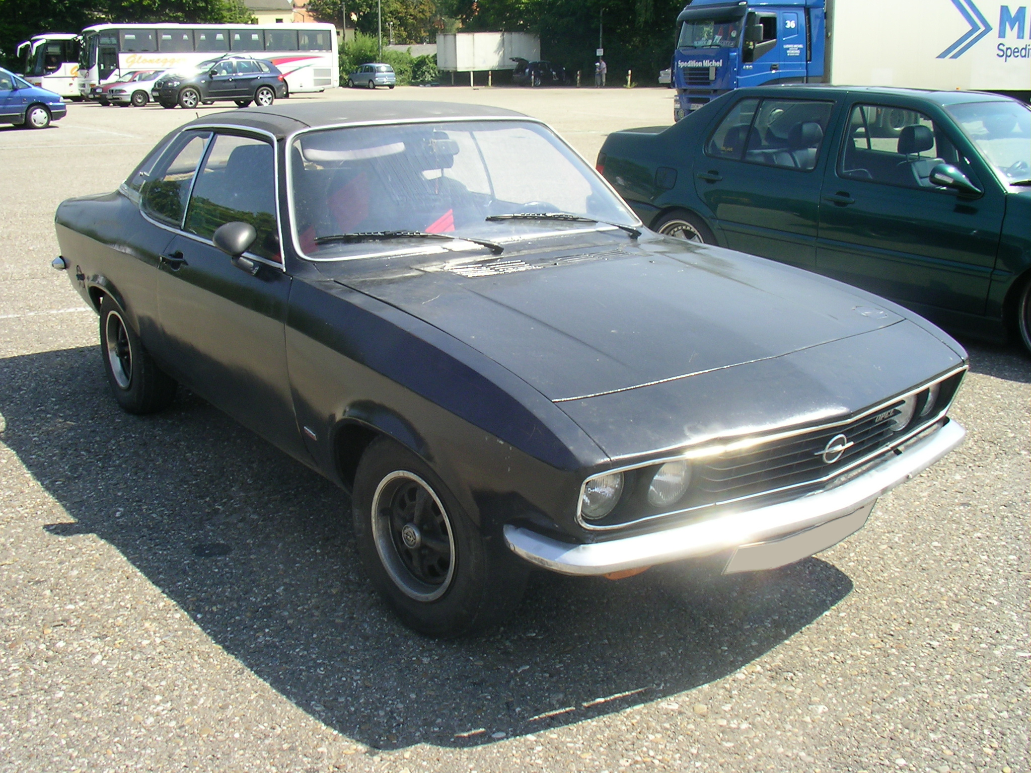 Opel Manta A